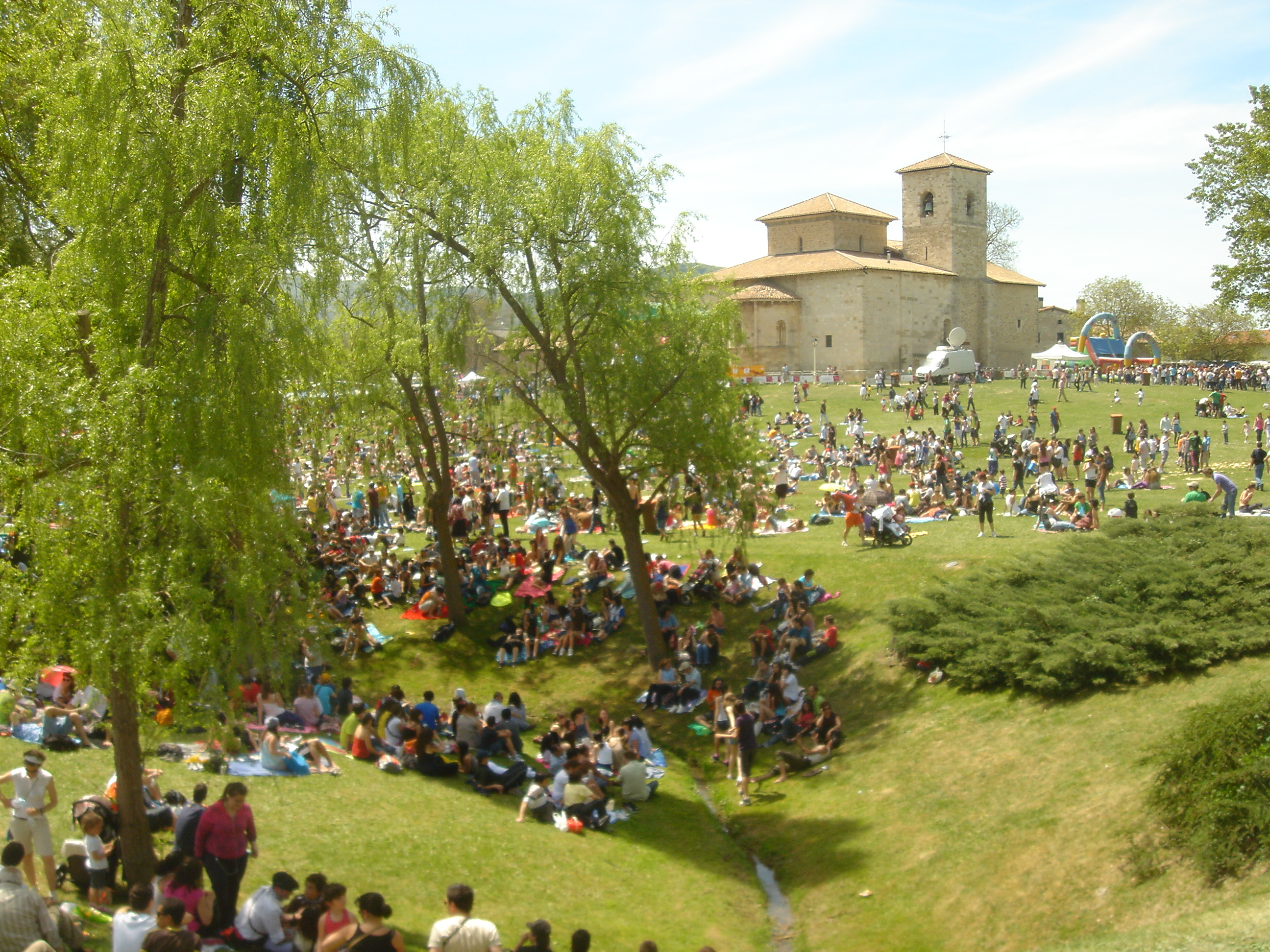 Armentian egiten diren San Prudentzio jaietako giroaren ikuspegia